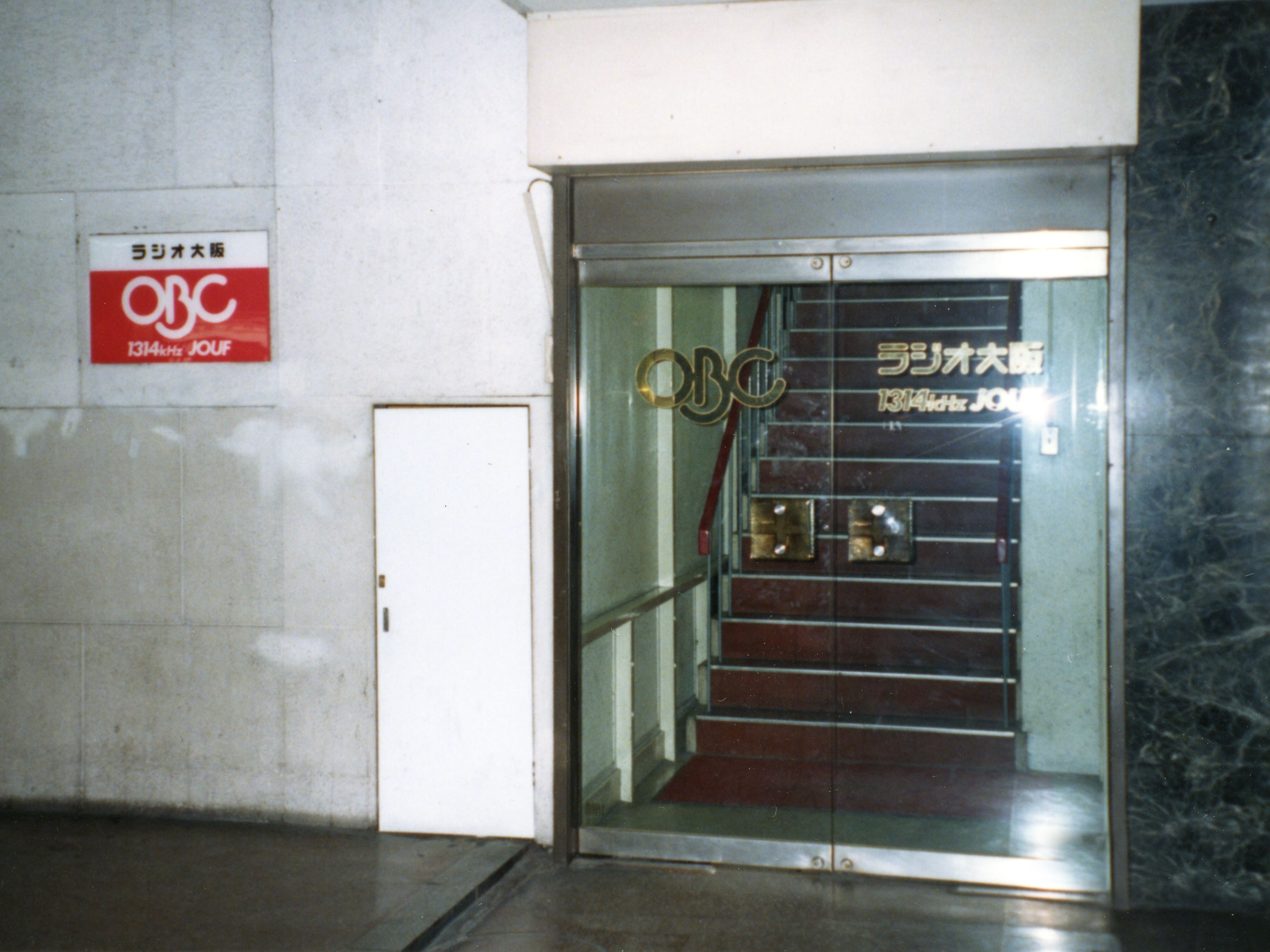 Former Osaka Broadcasting Corporation Headquarters,Umeda Kita-ku Osaka Japan.